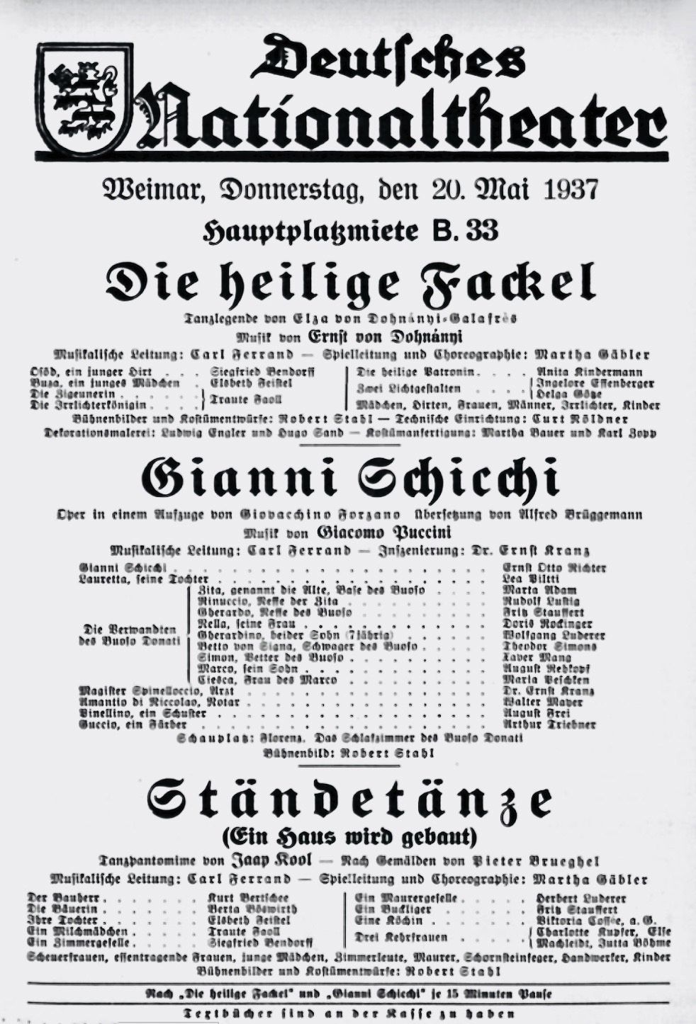 Deutsches Nationaltheater Weimar: Die heilige Fackel, Musik von Ernst von Dohnányi – Gianni Schicci, Musik von Giaccomo Puccini – Ständetänze (Ein Haus wird gebaut), Tanzpantomime von Jaap Kool